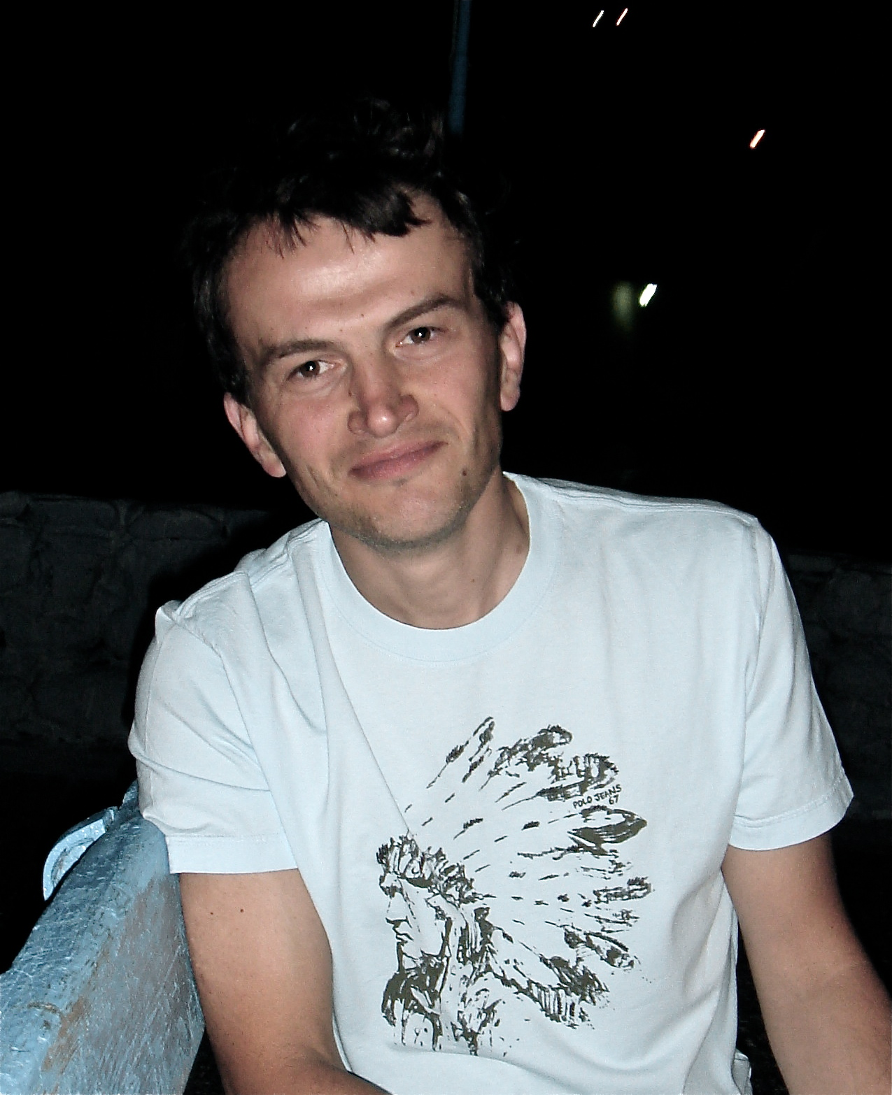 cliché de l'écrivain enquêteur Guillaume Dasquié